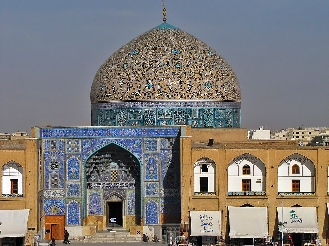 مسجد شیخ لطف الله